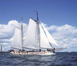 Two-mast clipper Succes Built by Wed. A. Van Duyvendijk Date of completion: 1909 1909 Named: DEPENDENT for mr de Waal 1938 Motor placed, 3 cylinder 120 hp 1946 After World War II the ship returned from Norway and got an extensive renovation, transporting predominantly sand and stones Sold to Mr Kornet, refit to crane ship to transport sand and stones to the south of Holland 1998 Sold to Mr T. Winkel, refit in Harlingen. Renamed to SUCCES 2004 Sold to Eveline en Wietse van Lingen